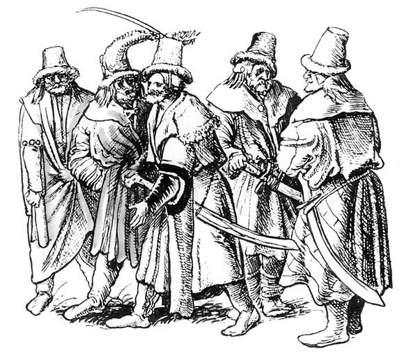 Группа страдиотов.